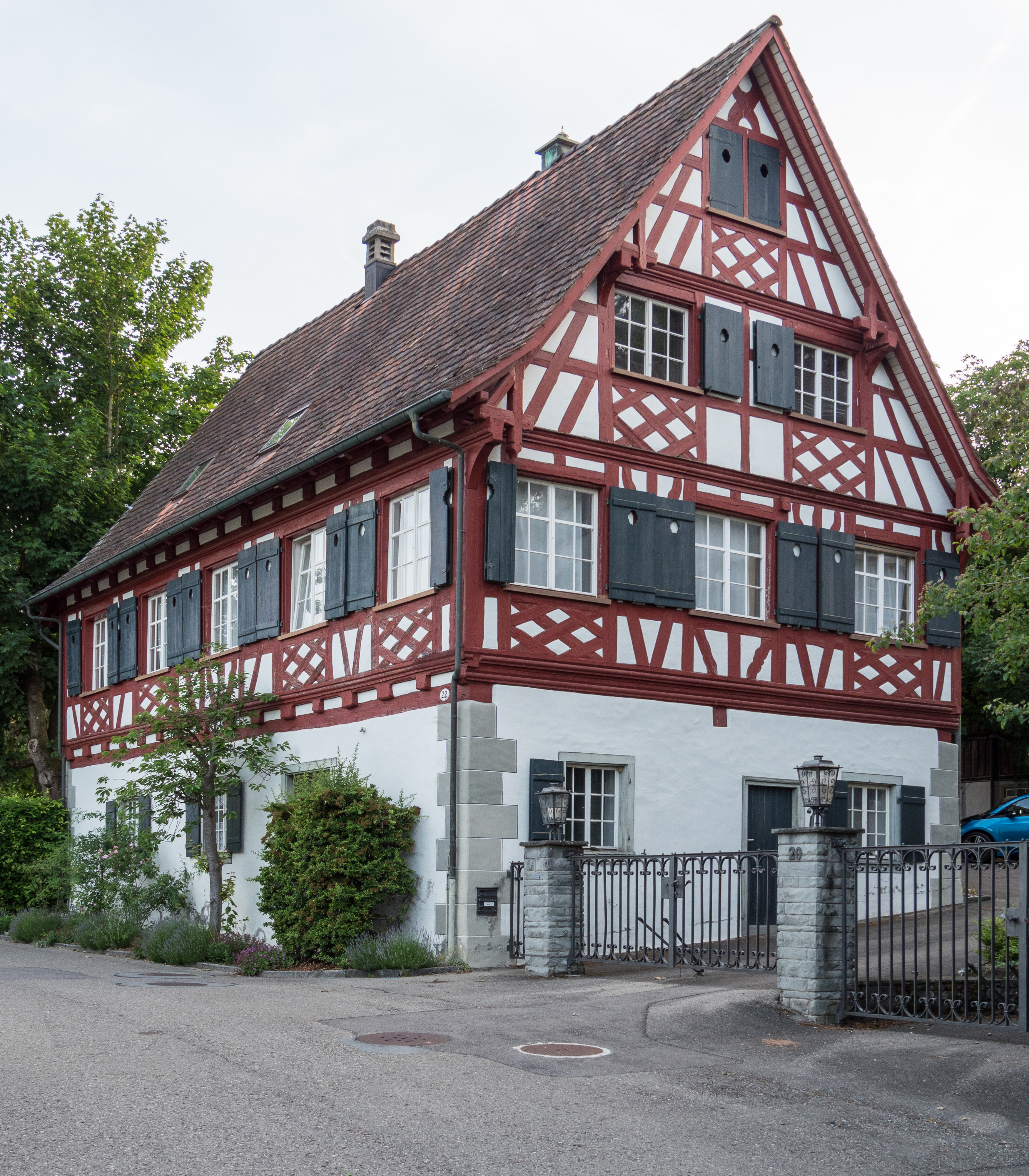 Ehemaliges Trotten- und Pächterhaus der Hofgruppe "Ebersberg" in Kreuzlingen. Erbaut 1798.